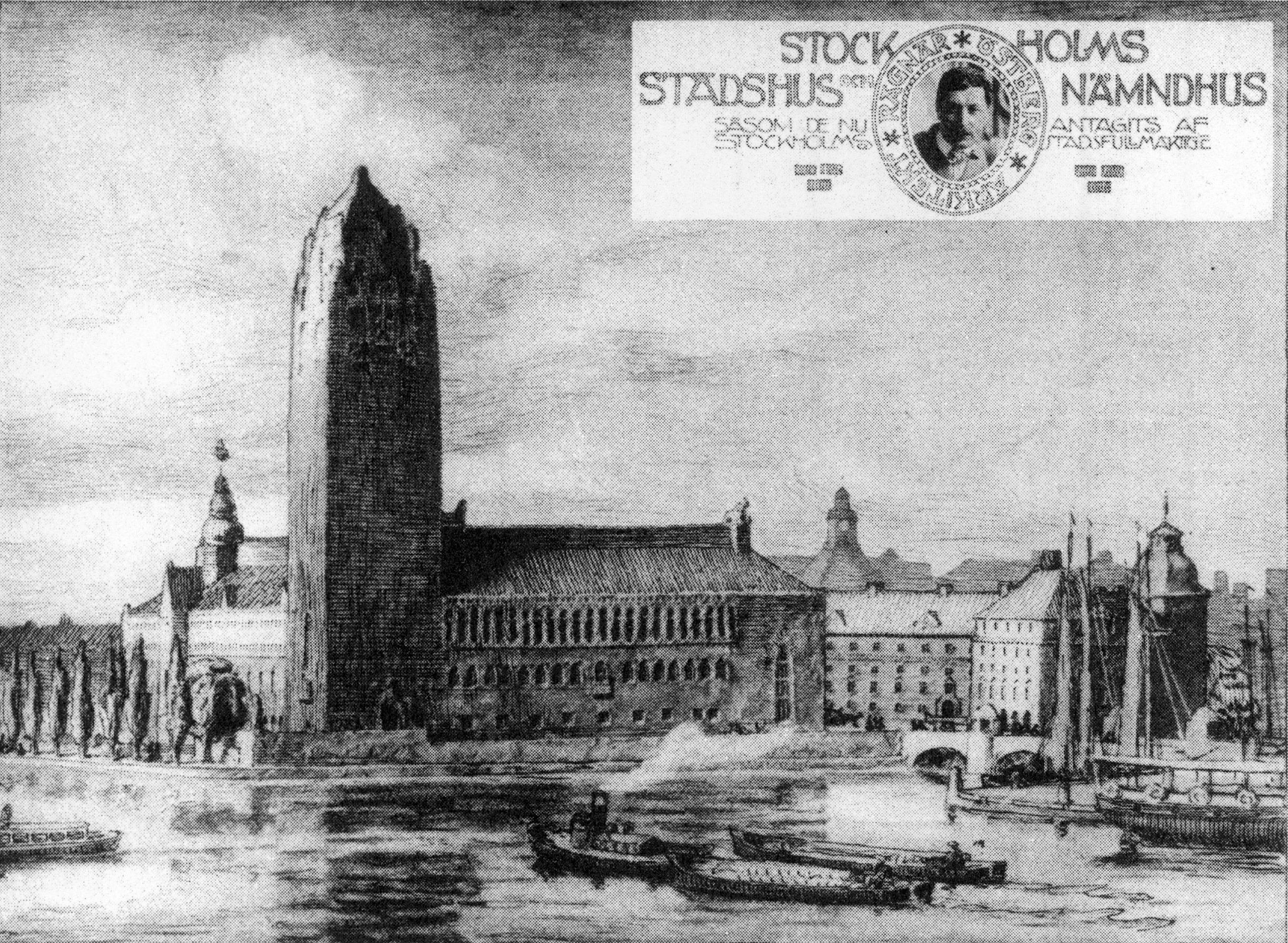 Stockholms stadshus, modell antagen av stadsfullmäktige 1911. (Ur Lindorm: Gustaf V och hans tid 1907–1918 [tryckt 1937], s. 195.)